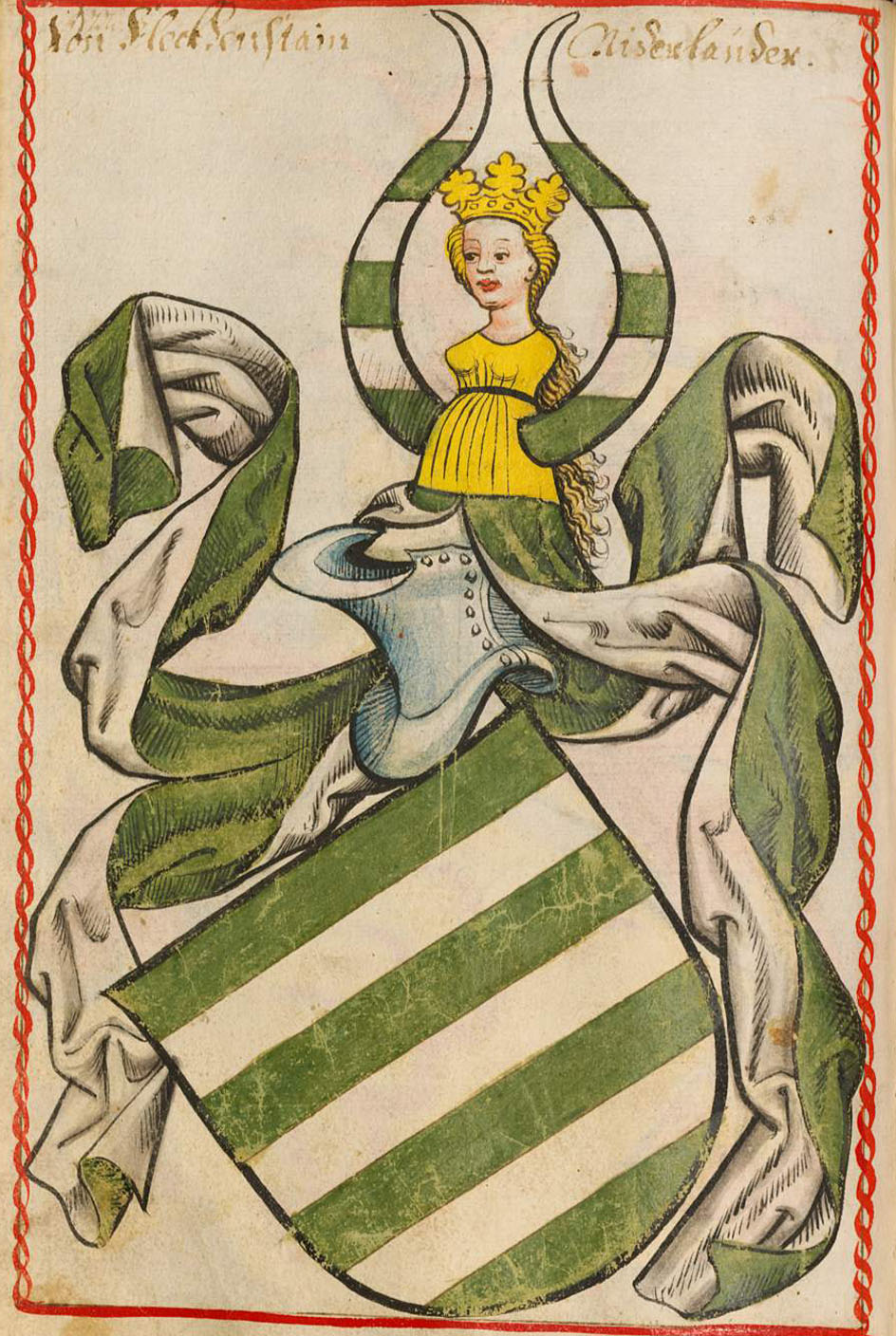 Scheibler'sches Wappenbuch , älterer Teil "Nieferländer" Fleckenstein